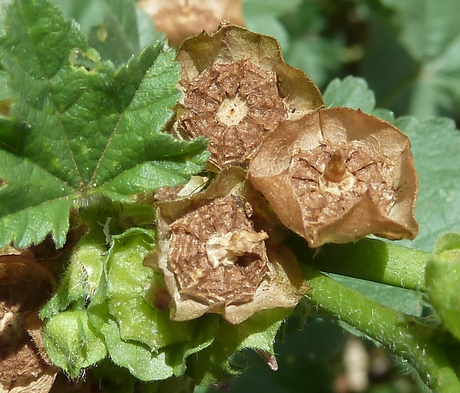 Malva parviflora (Malva, malva de flor chica): Frutos (esquizocarpos) maduros e inmaduros in situ - Descampado c./San Antonio con Compositor Manuel Berná García, Albatera (Alicante, España).